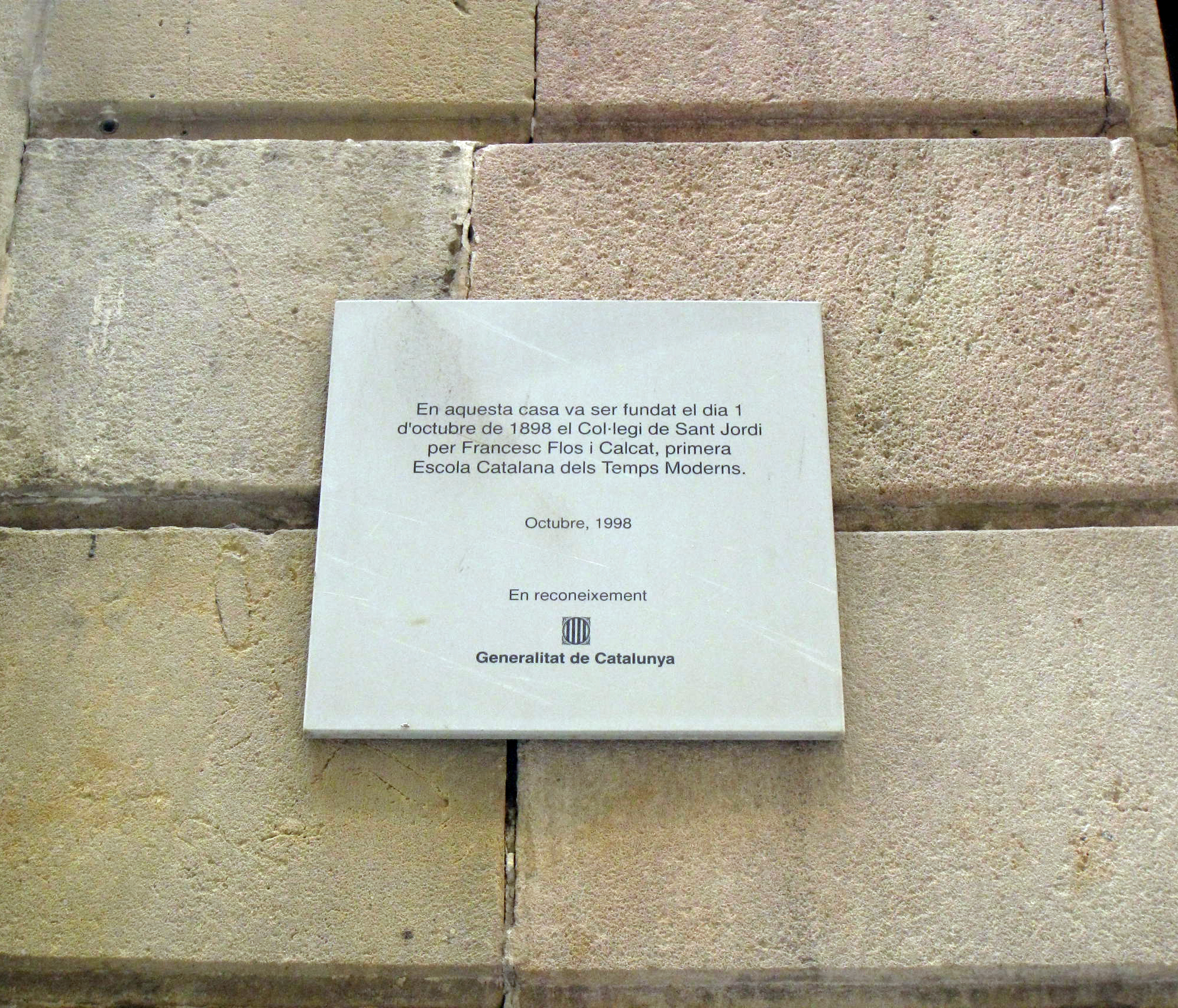 Col·legi Sant Jordi. C. Sant Honorat, 9 (Barcelona)